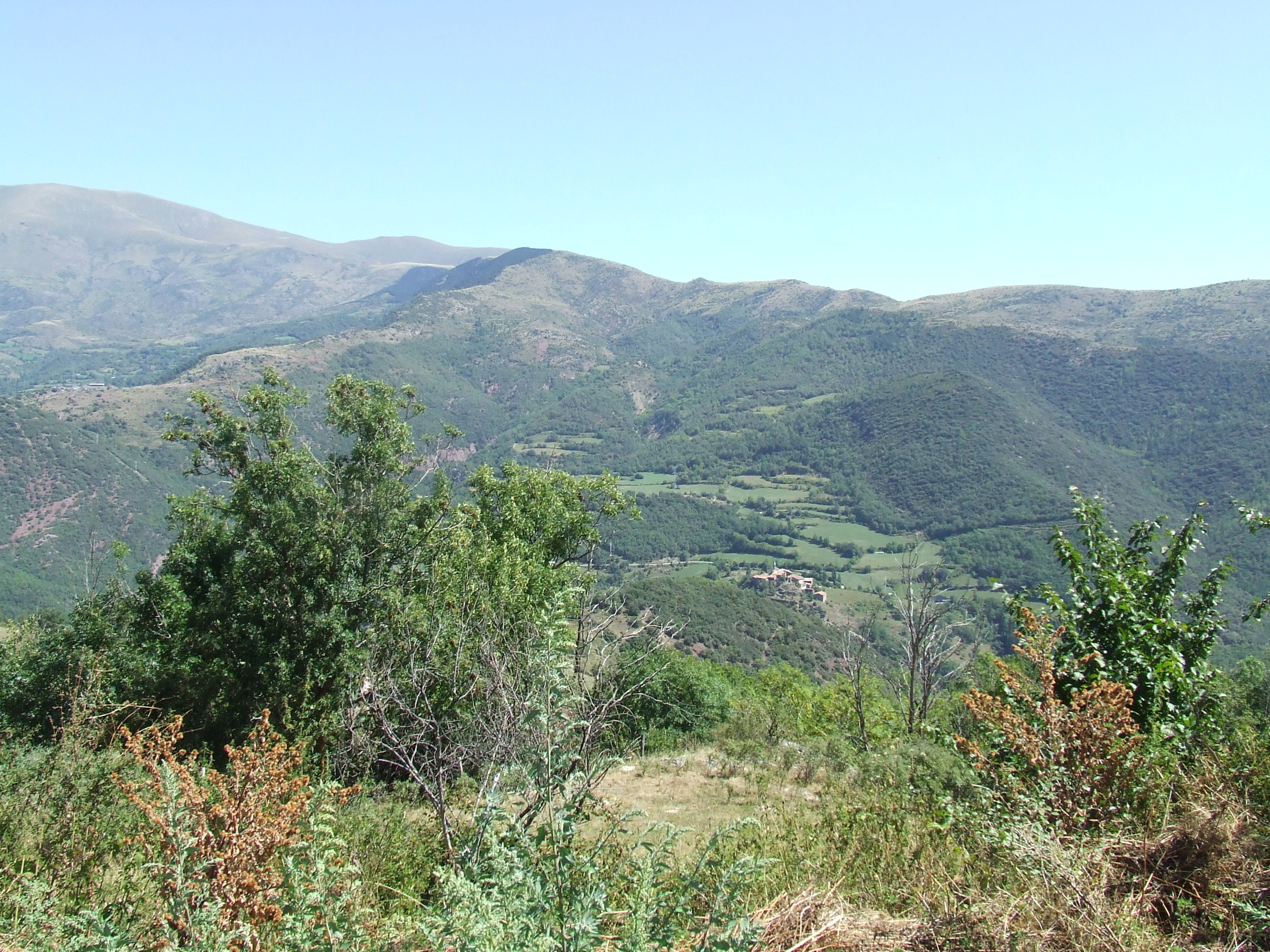 La vall de Beranui i Gramenet (Mont-ros, la Torre de Cabdella, Pallars Jussà)